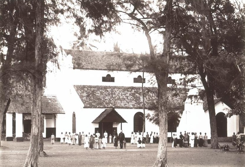 കോഴിക്കോടുള്ള ബാസൽ മിഷൻ പള്ളി